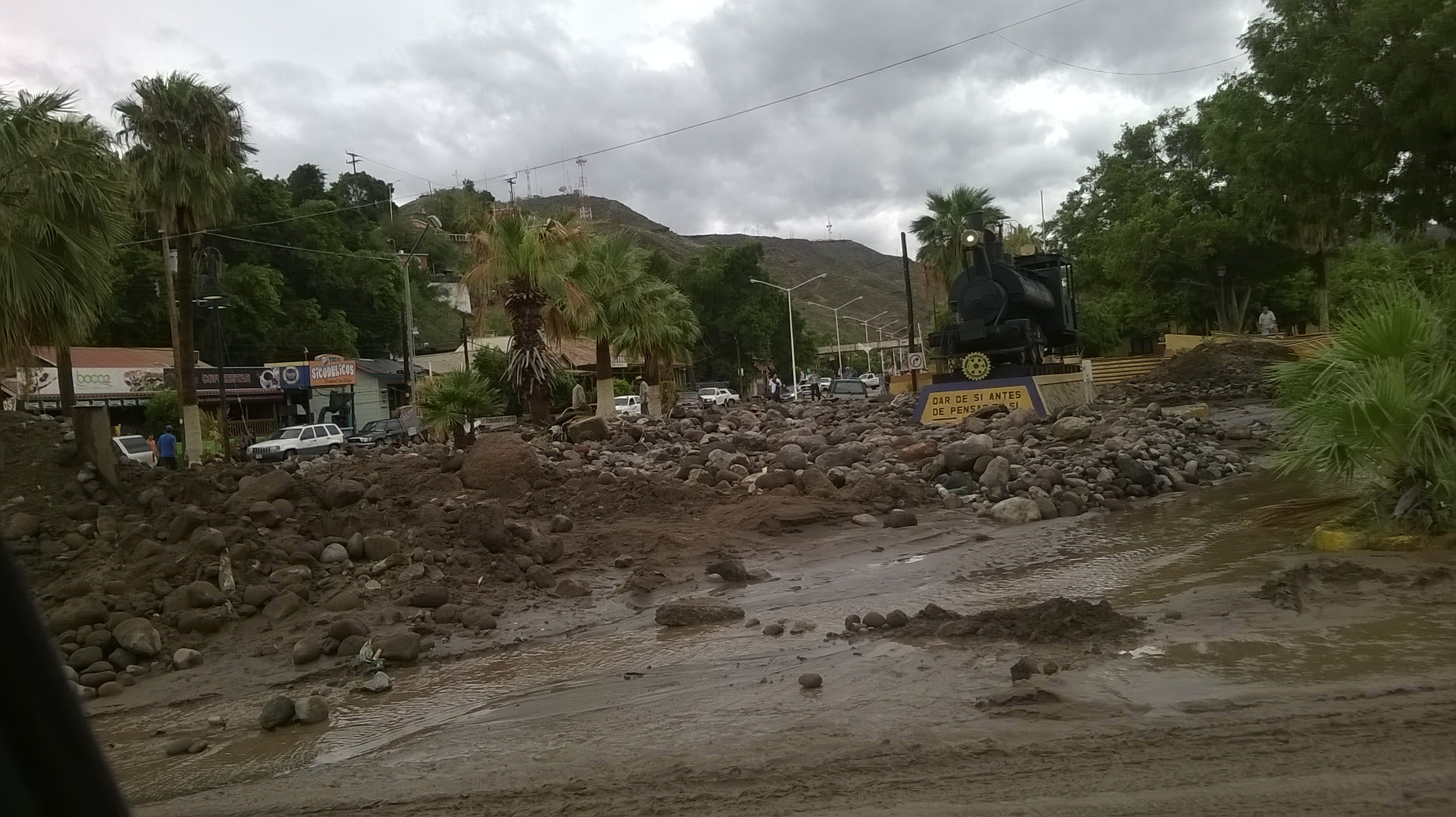 Afectaciones en el municipio Múlege 15 de septiembre de 2014